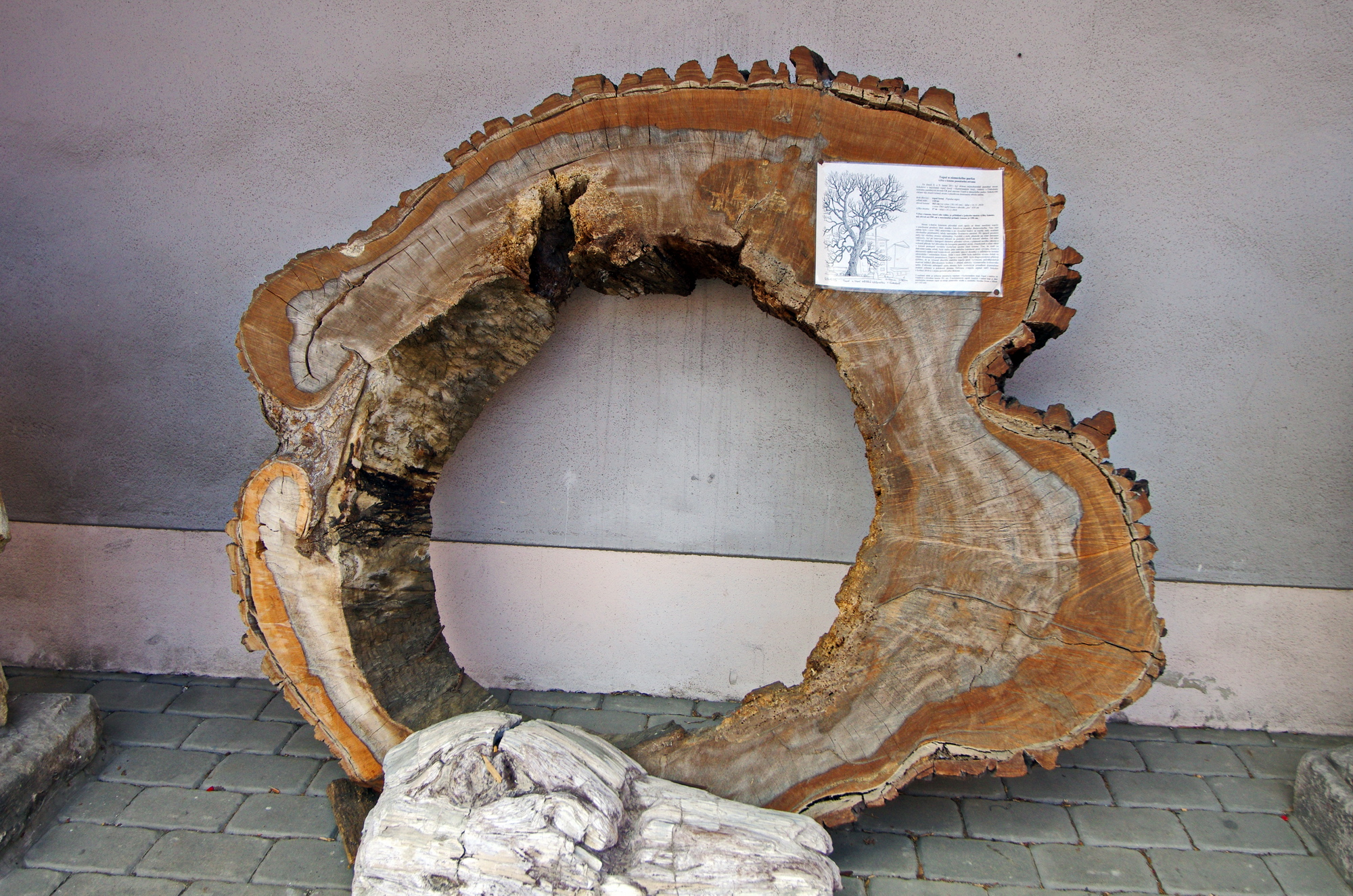 Sokolov, nádvoří zámku s kotoučem z kmene památného stromu Topol u zámeckého parku